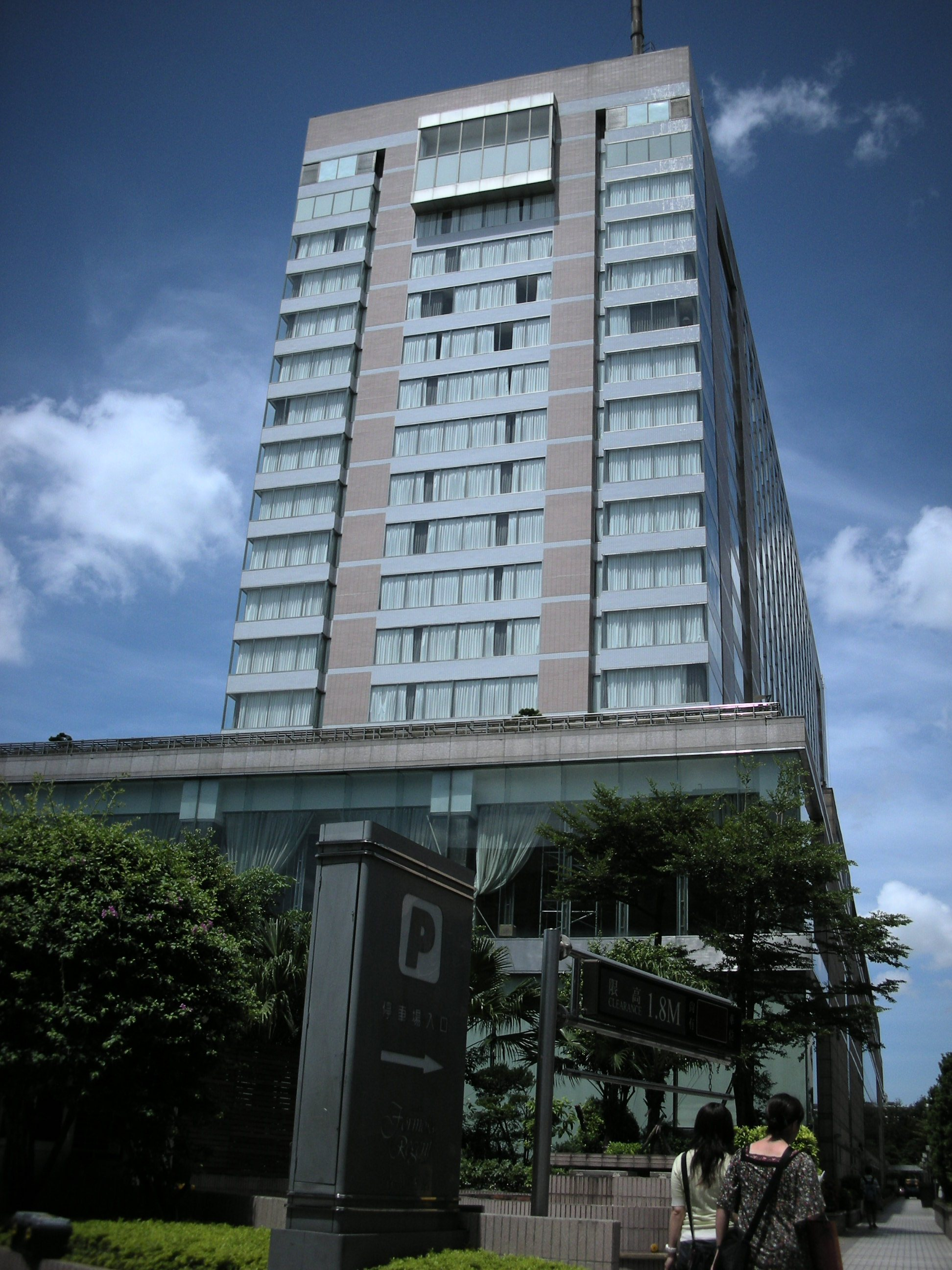 中文（台灣）: 台北晶華酒店後方外觀與地下停車場入口。